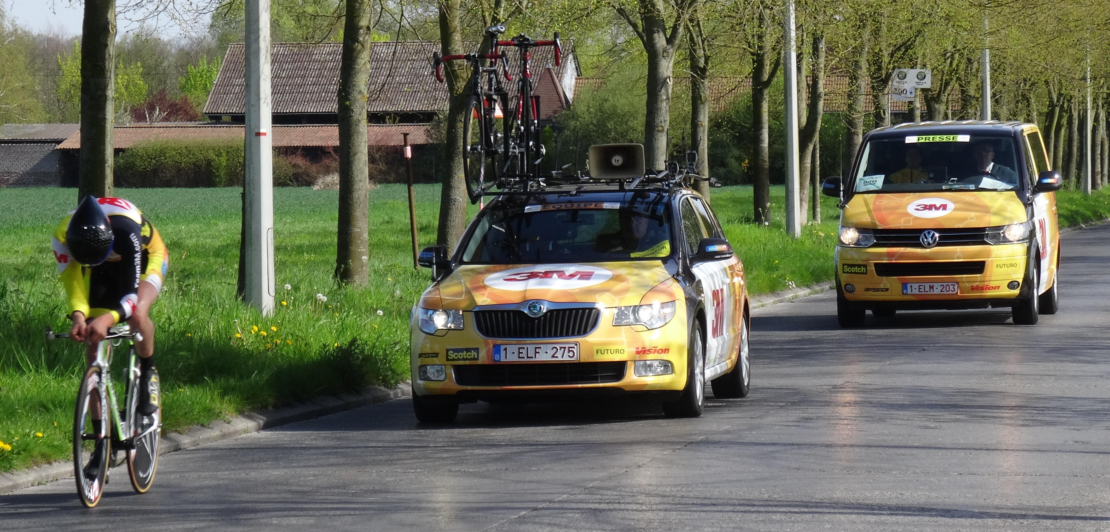 Triptyque des Monts et Châteaux 2014, étape 2a, 5 avril 2014, contre-la-montre individuel à Bernissart. Depicted person: Tim Vanspeybroeck Depicted team: 3M The creation of these files was made possible thanks to the organizers of the Triptyque des Monts et Châteaux 2014 English | français | +/−